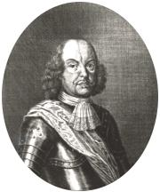 Johann VI. (Anhalt-Zerbst)